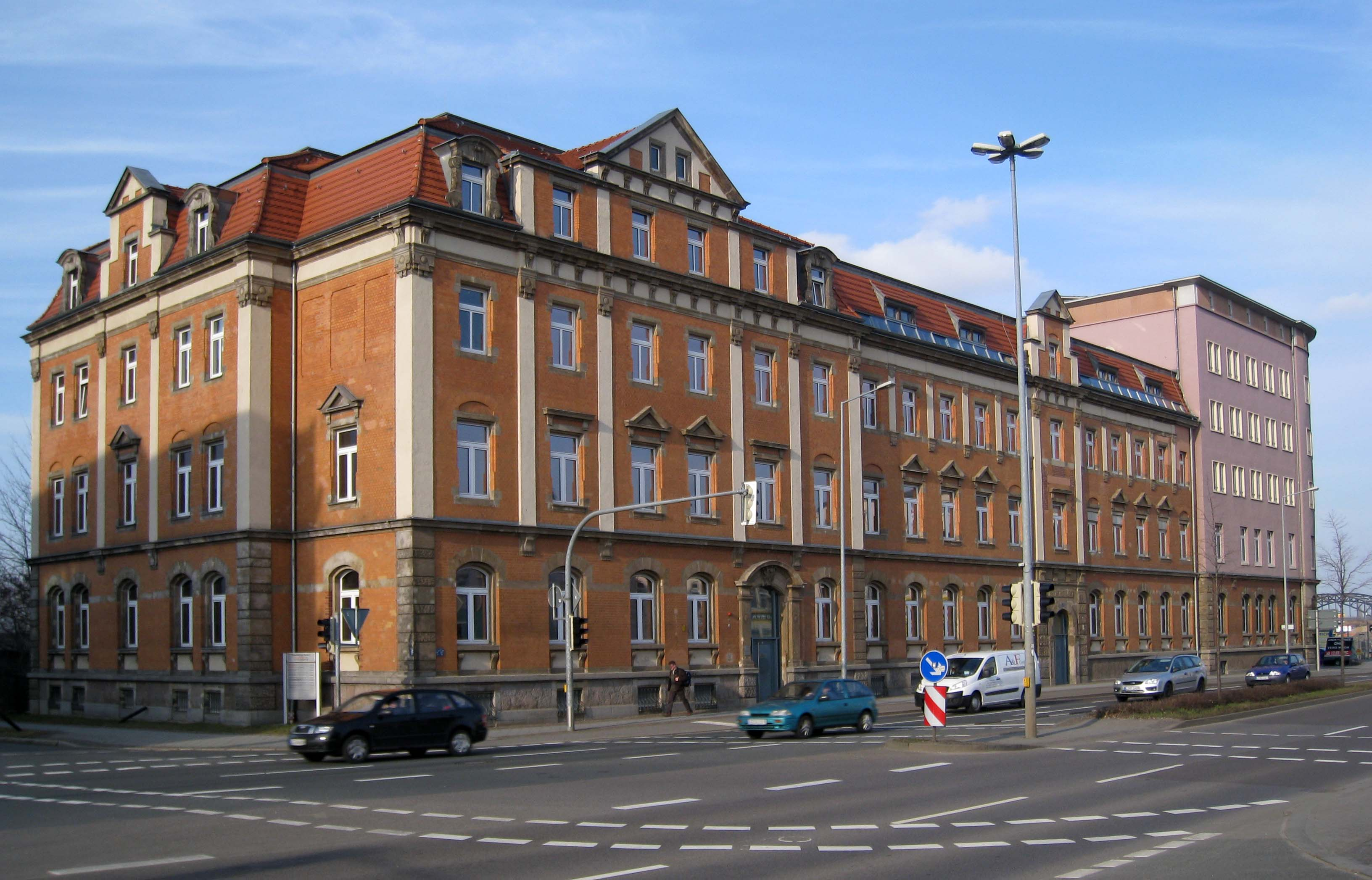 Gebäude früheres Reichsbahnamt Leipzig, unterstellt der Rbd Halle; jetzt Deutsche Bahn AG Regionalbereich Südost; Brandenburger Straße 3, 04103 Leipzig